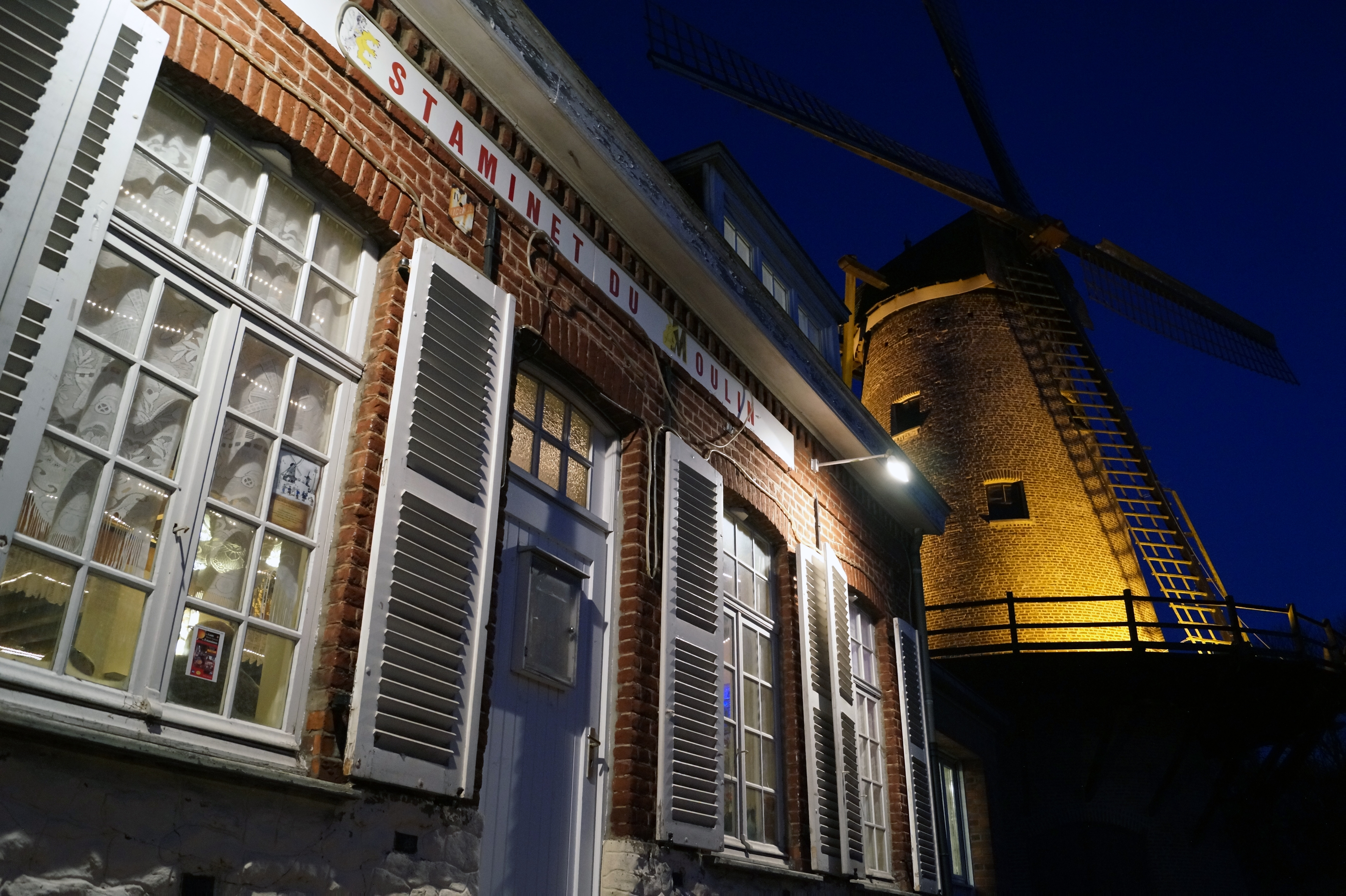 Construit en 1877 par Cyrille HOLLEBEKE, meunier, sur le terrain dénommé pont de Vos il subit des aménagements successifs et cesse son activité en 1930 après que trois meuniers successifs se soient battus pour continuer l’activité. La maison du meunier, bien que modifiée à plusieurs reprises, a conservé l’essentiel de ses caractéristiques architecturales d’origine. La Ville achète le bâtiment d’habitation et la ruine du moulin en 1988 et en 1989, les travaux de restauration commencent. La galerie, qui permet de lancer les ailes, est supportée par 27 pièces de bois de 3,50m de long, la calotte pèse 12 tonnes… Les travaux s’achèveront en mai 1992 avec la pose des ailes. Depuis 1989, le moulin est inscrit à l’inventaire supplémentaire des monuments historiques drâce à sa galerie circulaire, unique dans la région lilloise. En 2001, de nouveaux travaux sont effectués pour compléter ce site touristique avec l’aménagement d’un estaminet, d’une halle extérieure et d’espaces verts. En mémoire à Roger Beke, Président de l'Association « Les Amis du Moulin » qui s'est battu pour ses enfants, le Moulin et son Estaminet.